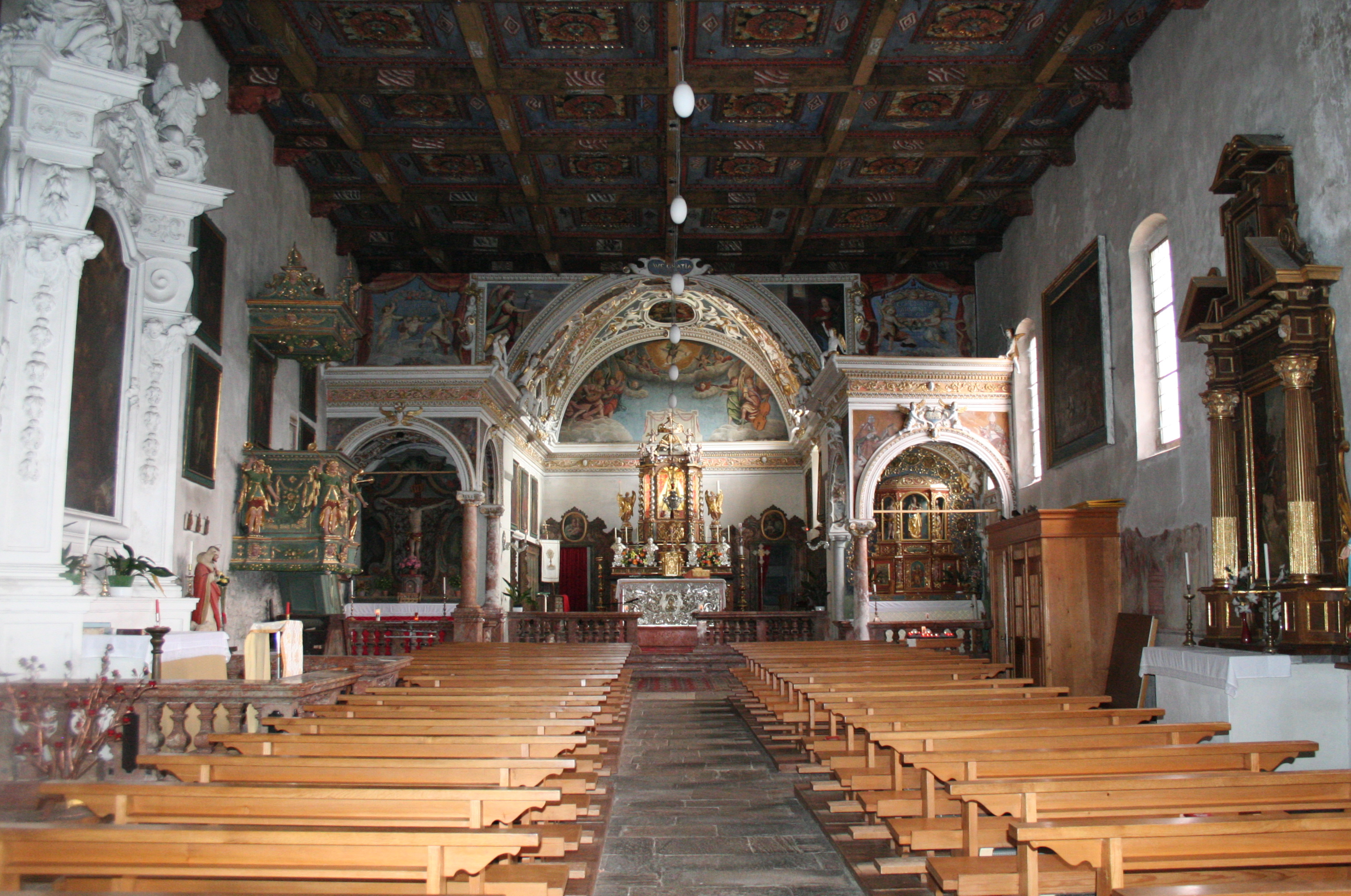 Kirche Sta. Maria Assunta Calanca: Innenraum